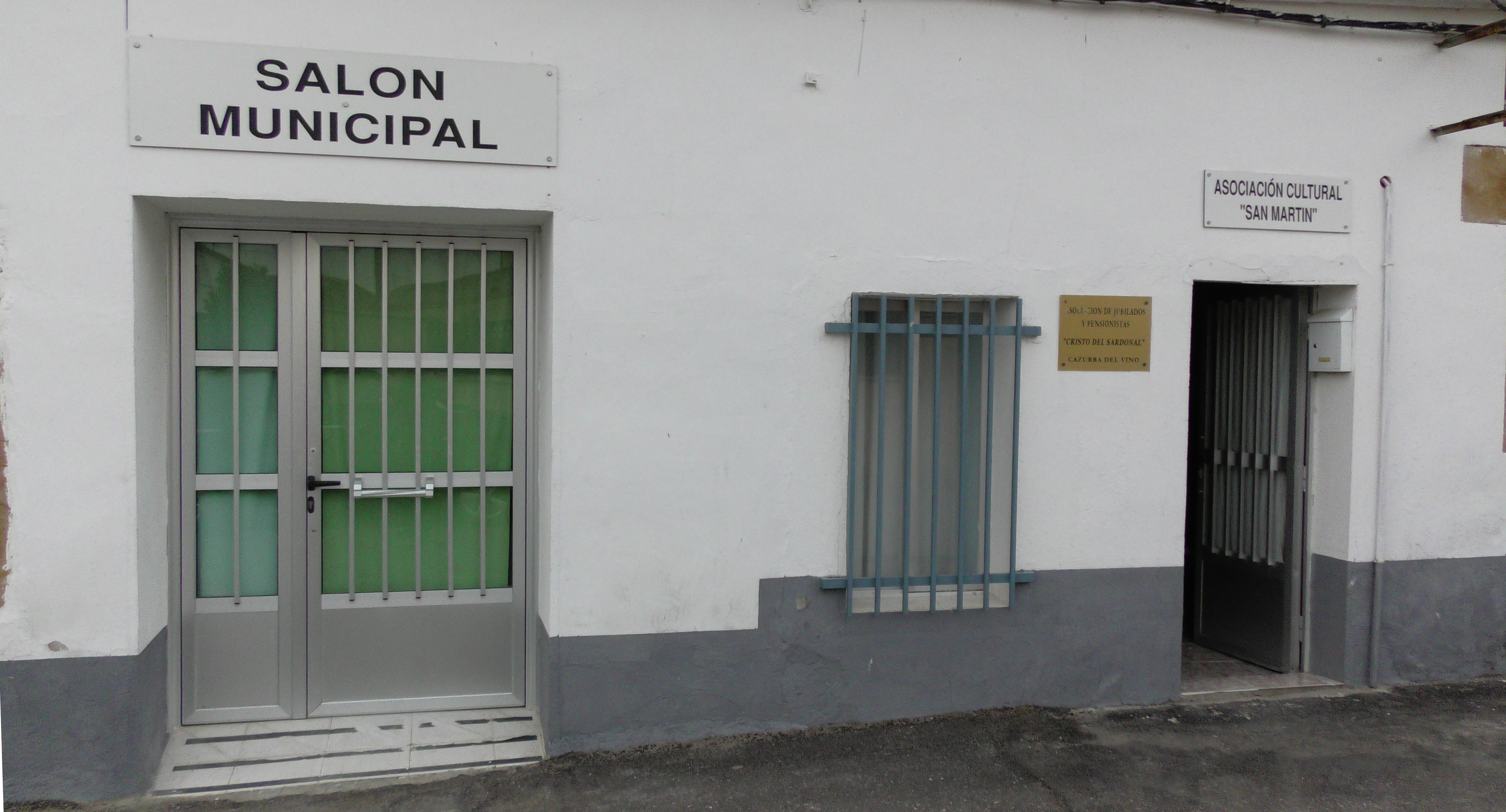 Cazurra